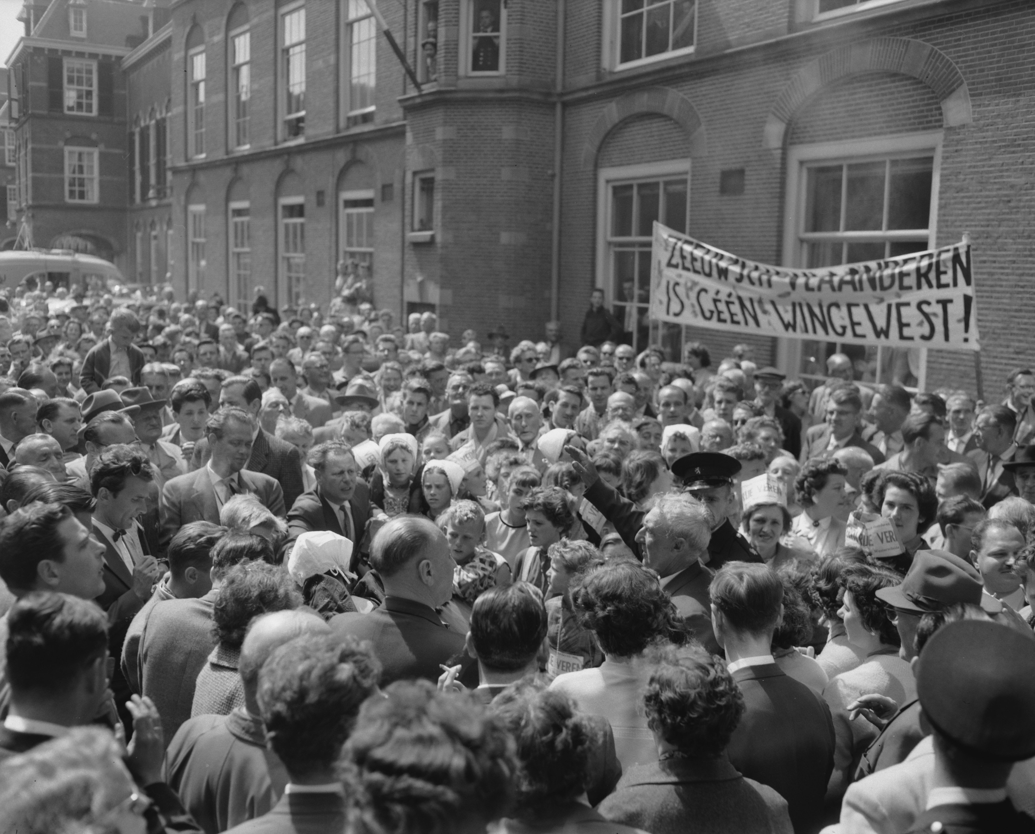 Collectie / Archief : Fotocollectie Anefo Reportage / Serie : [ onbekend ] Beschrijving : Vrije Verendemonstratie op het Binnenhof in Den Haag Datum : 13 juni 1958 Locatie : Den Haag, Zuid-Holland Fotograaf : Behrens, Herbert / Anefo Auteursrechthebbende : Nationaal Archief Materiaalsoort : Negatief (zwart/wit) Nummer archiefinventaris : bekijk toegang 2.24.01.04 Bestanddeelnummer : 909-6331